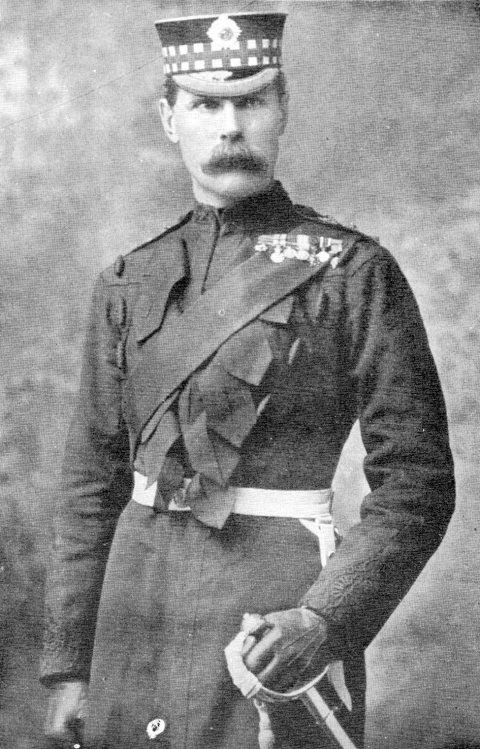 Paul Methuen, 3rd Baron Methuen (1845-1932)